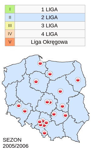 Jagiellonia Białystok w sezonie 2005/2006 -mapka